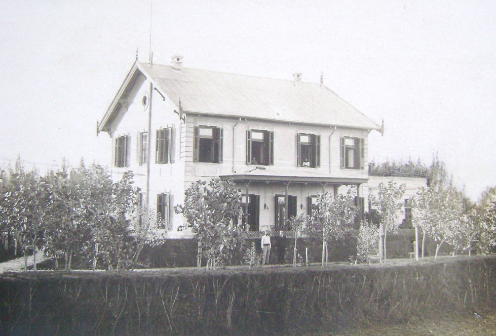 Vista del chalet y parque diseñado por el arquitecto y paisajista Carlos Thays, para la compañía Sansinena. Construido a comienzo del Siglo XX